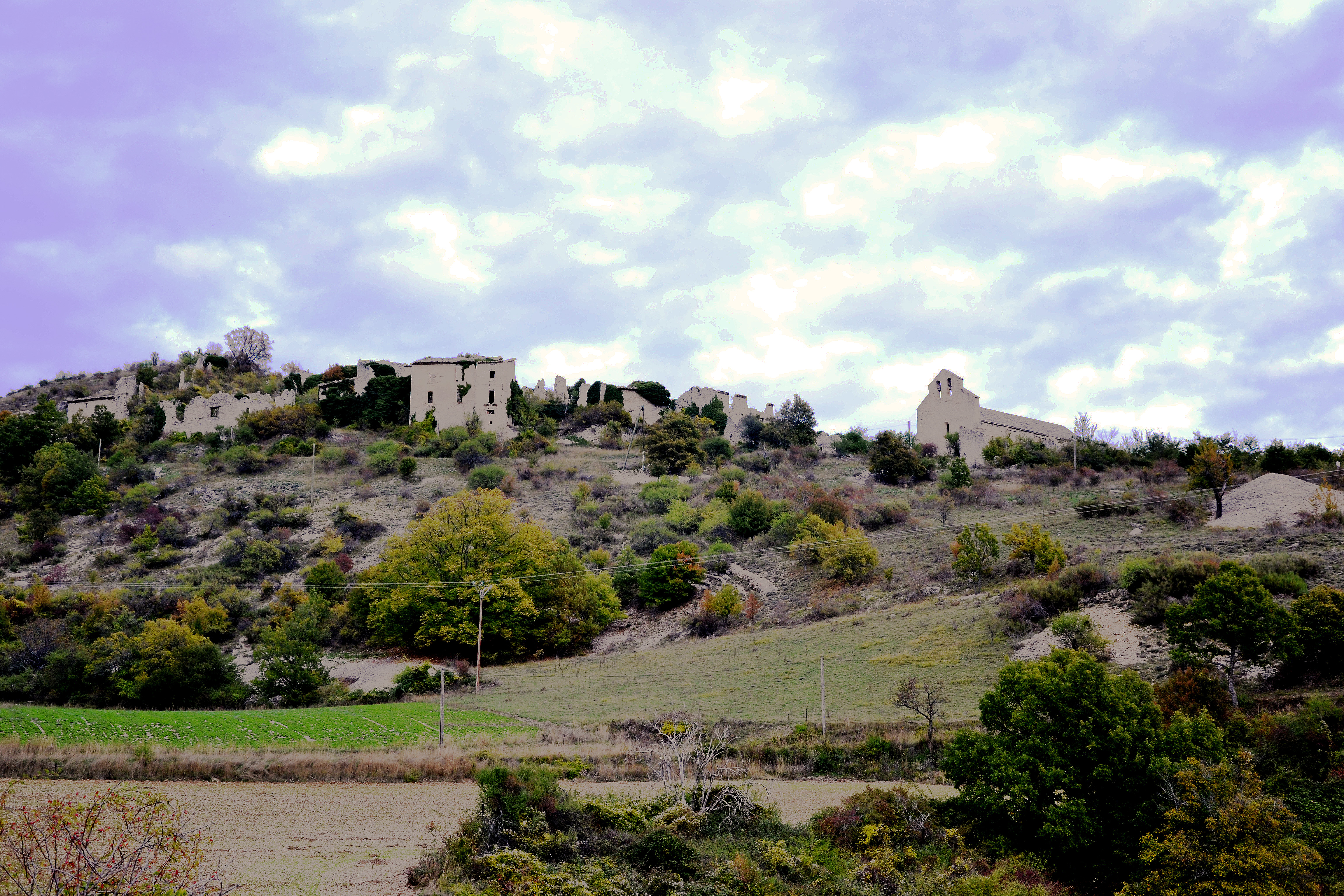 Village abandonné du Vieux Noyers, commune de Noyers sur Jabron (04)